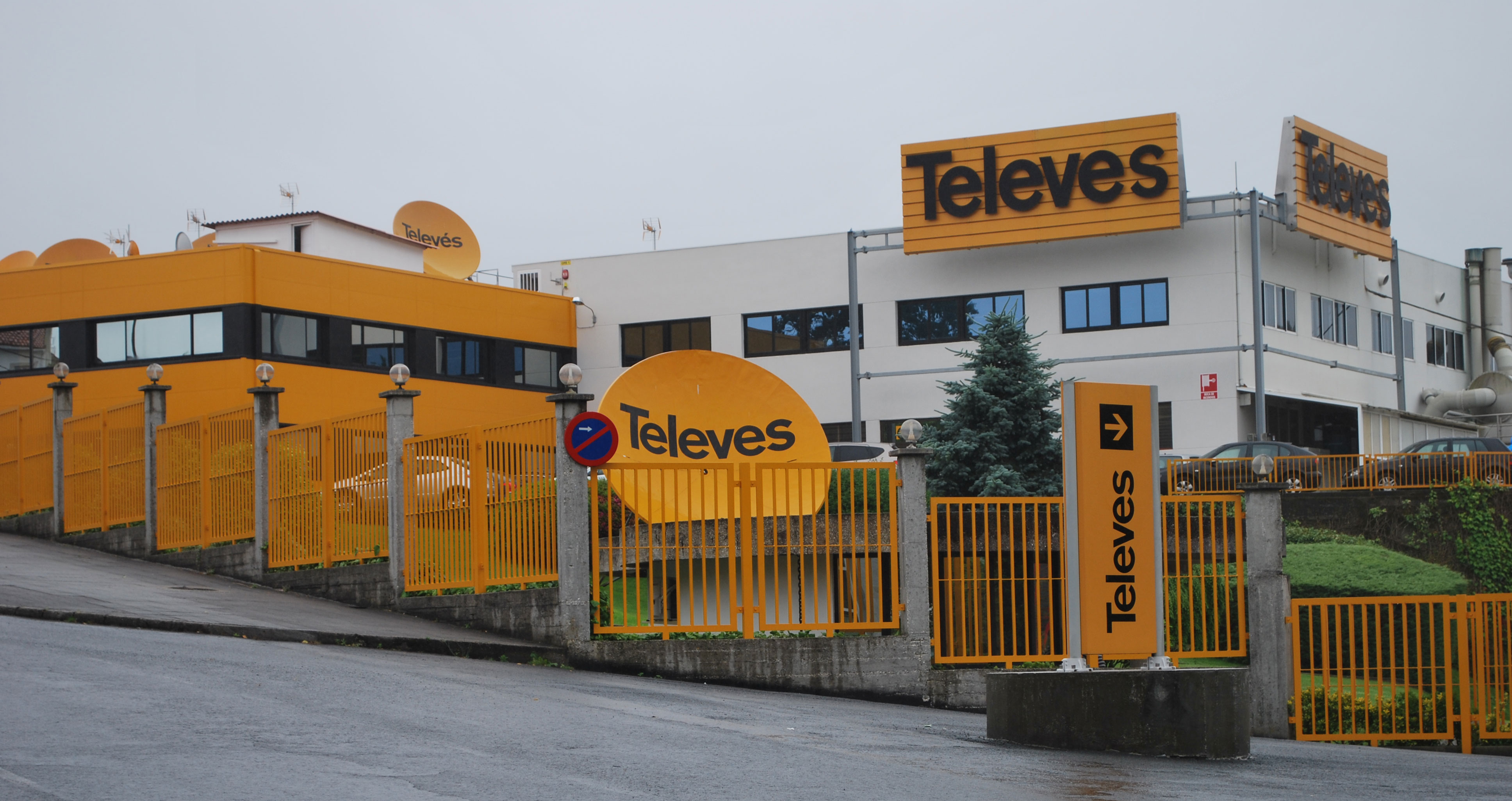 Acceso a Televés en Conxo Santiago de Compostela A Coruña Galiza Spain